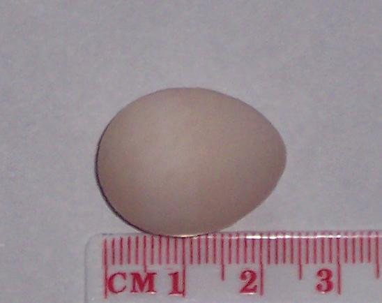 A cockatiel egg.